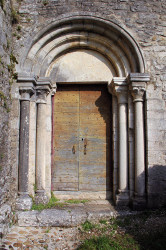 petit portail du XIIème de l'église de Gigny